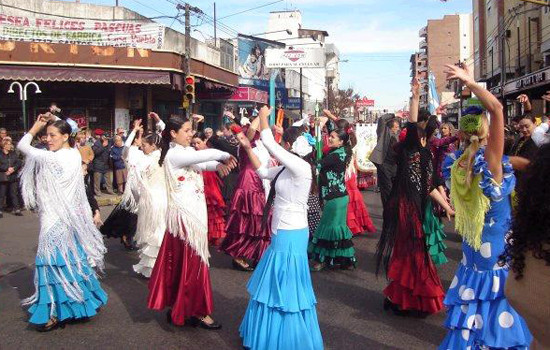 Colectividad gitana en Argentina.